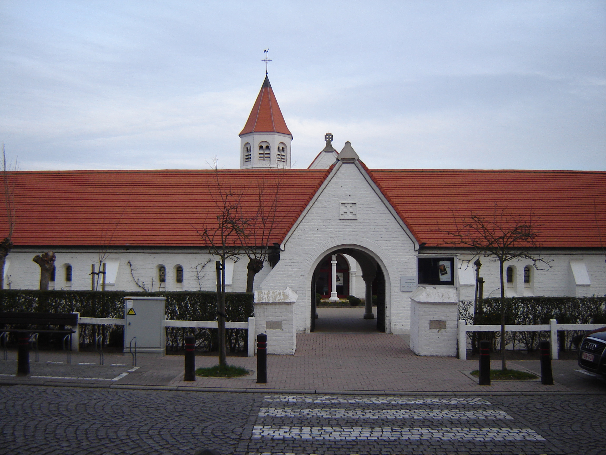 Dominicanenkerk in Knokke (Zoutekerkje). Dominicanenkerk (Dominican church) in Knokke (Zoutekerkje). Knokke, Knokke-Heist, West Flanders, Belgium